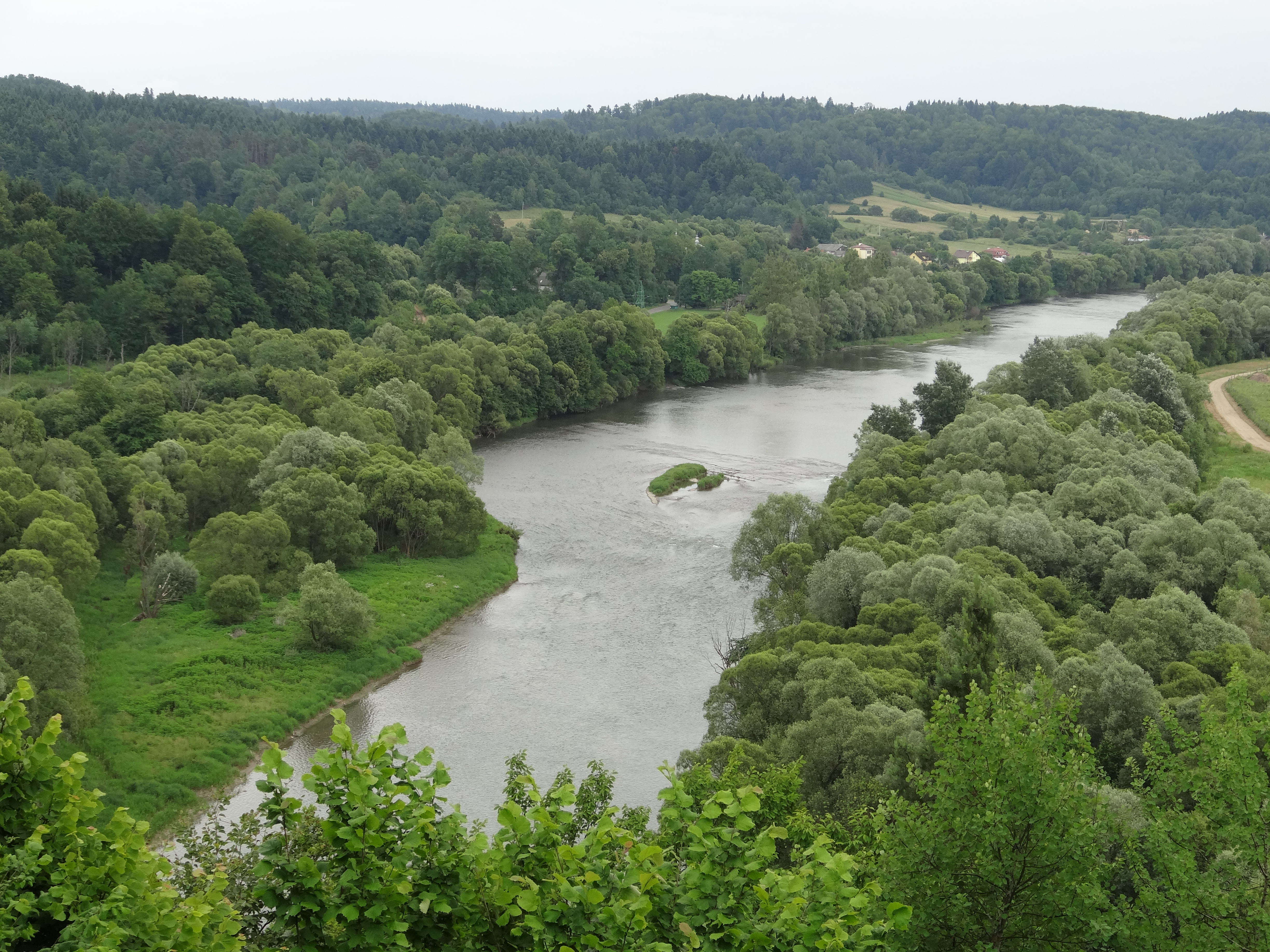 Gmina Lesko, Poland